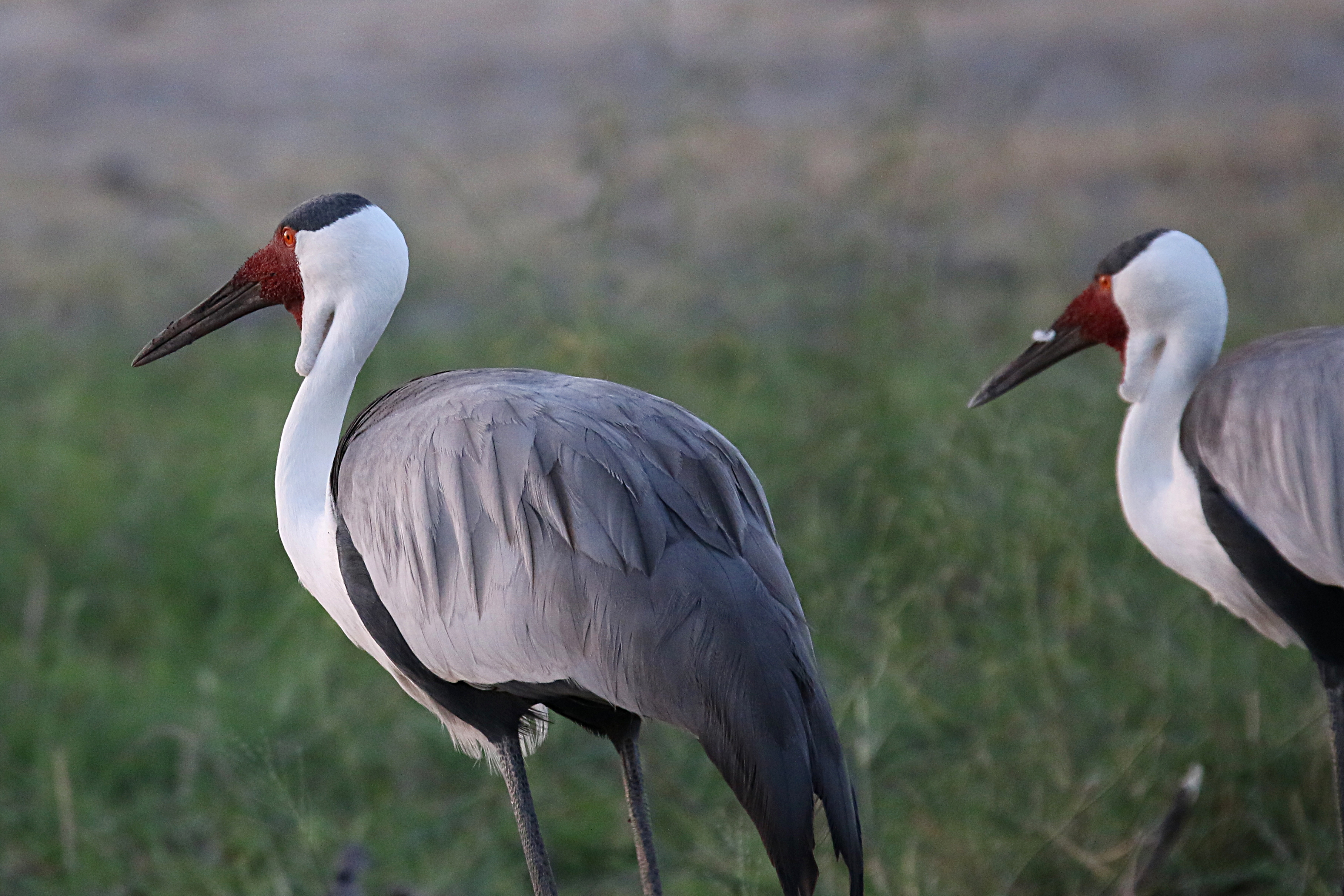 Wattled Crane Grus carunculata, Linyanti, Caprivi, Namibia.